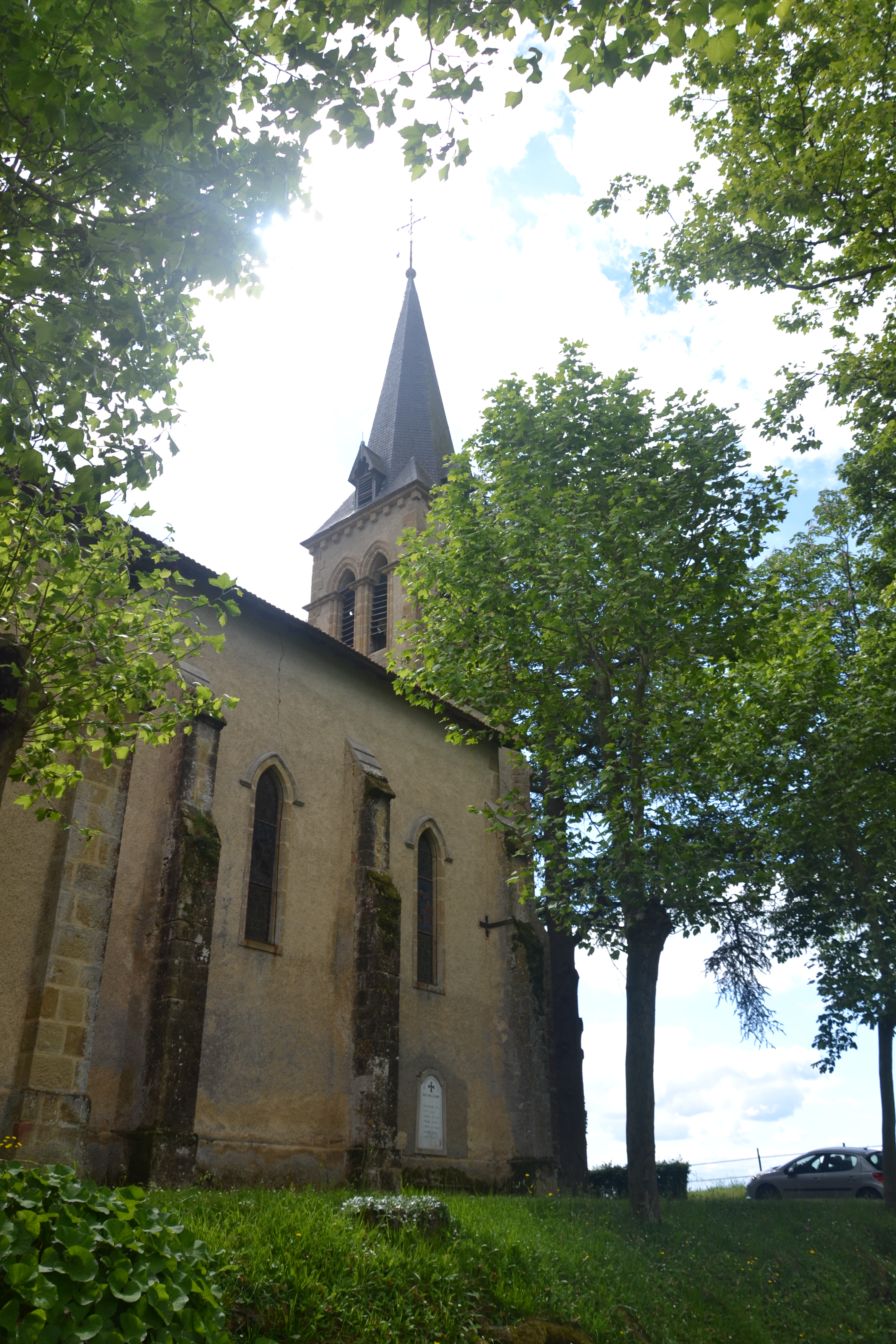 église Saint Martin à Armous et Cau